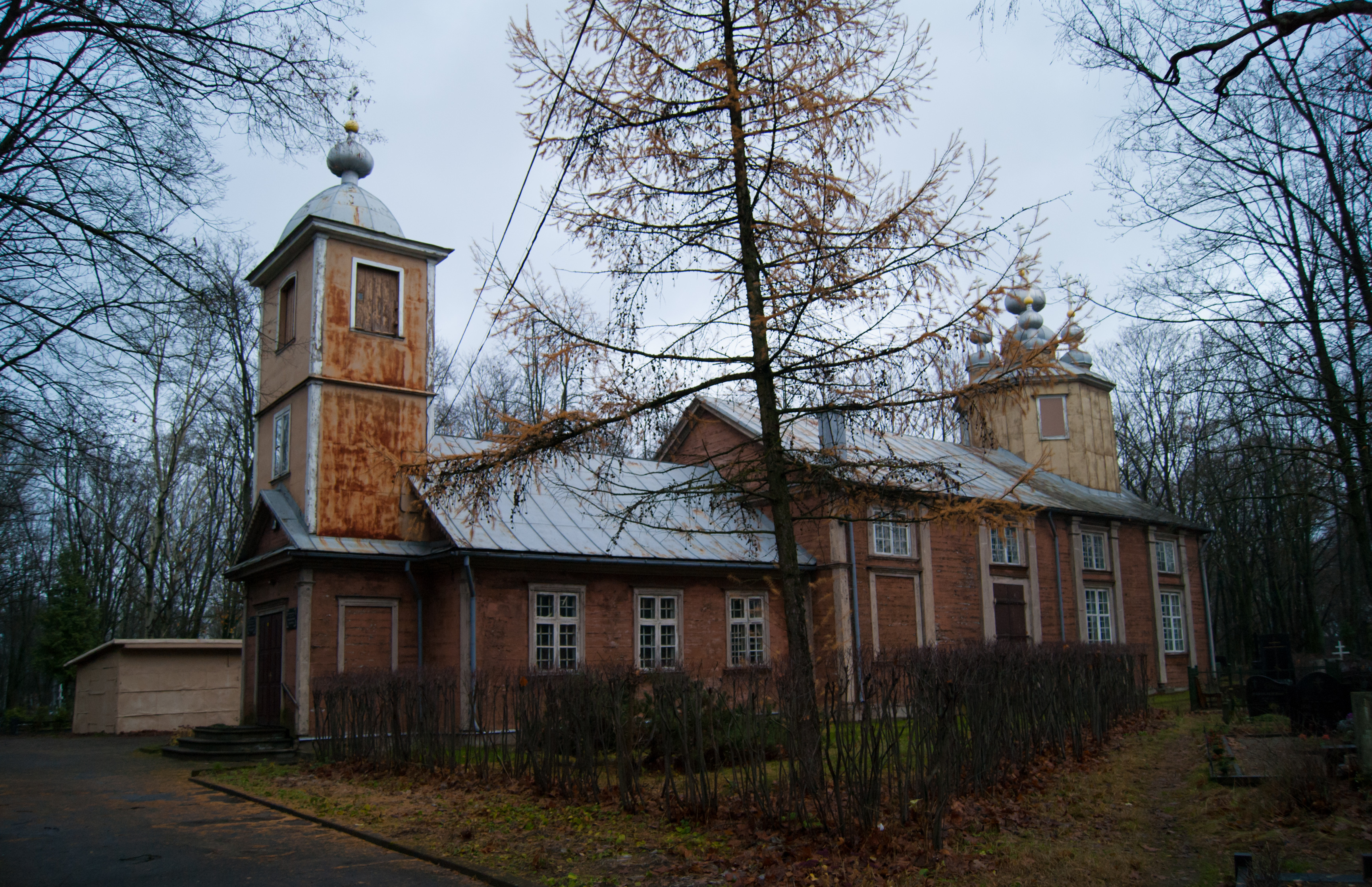 Church in Riga